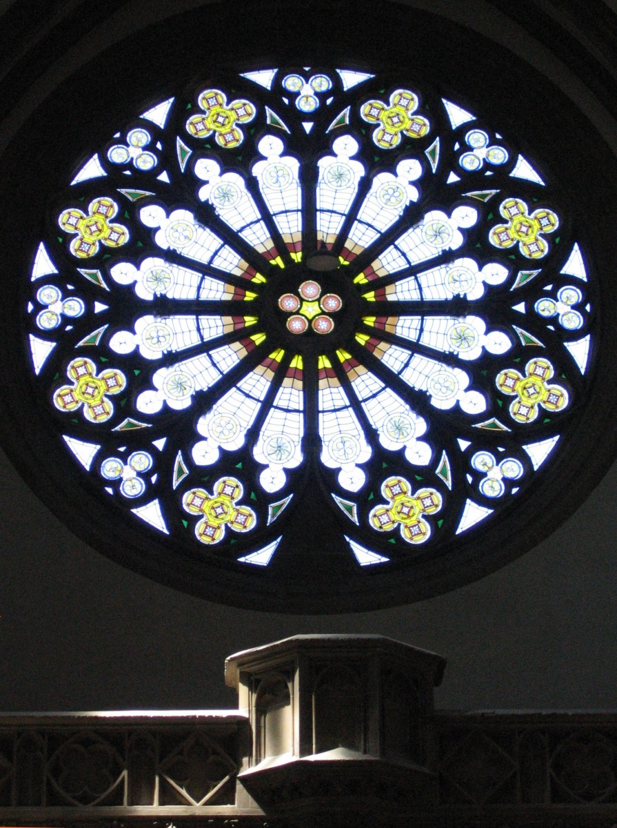 St. Paul in München, Rosettenfenster über dem Eingang